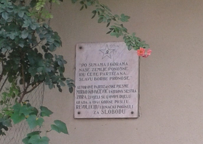 Спомен плоча на једој згради у Обилићеву (Бања Лука)